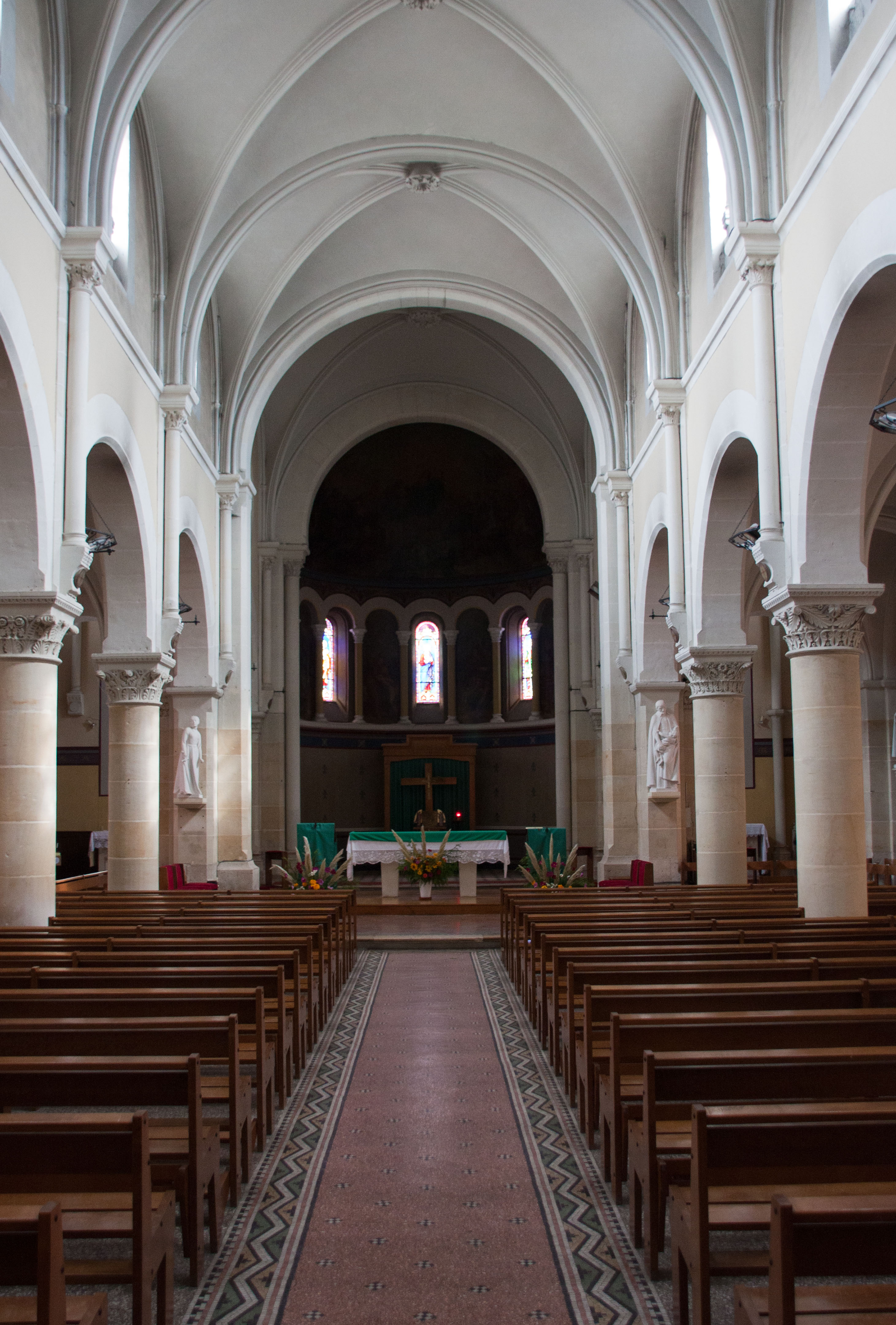 Église Sainte-Anne de Lamotte-Beuvron - Lamotte-Beuvron, Loir-et-Cher, France